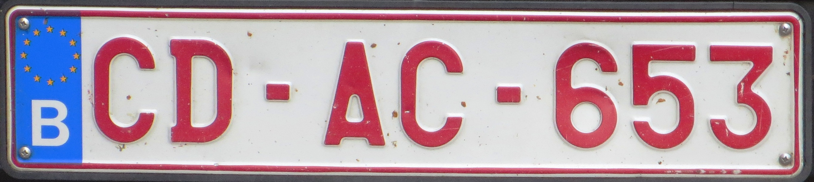 België CD plaat